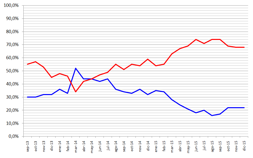 Porcentajes de aprobación (línea azul) y rechazo (línea roja) de la Nueva Mayoría (Chile) Información encuesta Adimark ( desde septiembre de 2013 en adelante.